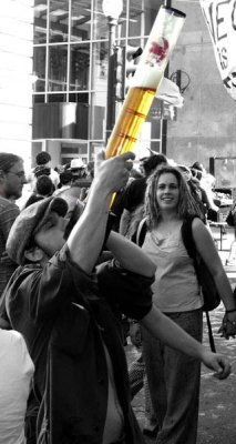 Un mètre (appellé aussi Girafe) de bière bu au goulot.